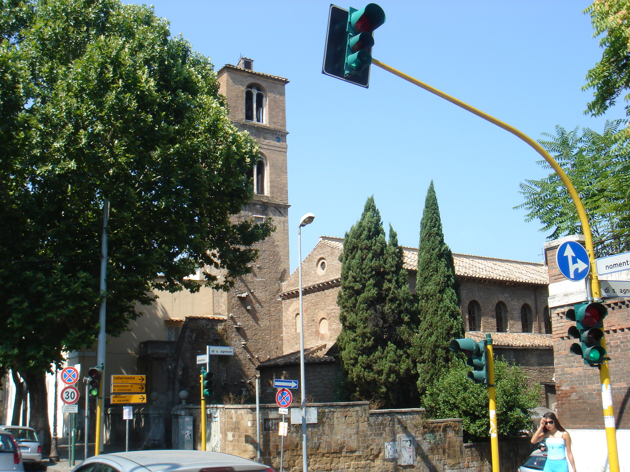 Roma , sant'Agnese fuori le mura: veduta moderna su via di sant'Agnese. Licensing